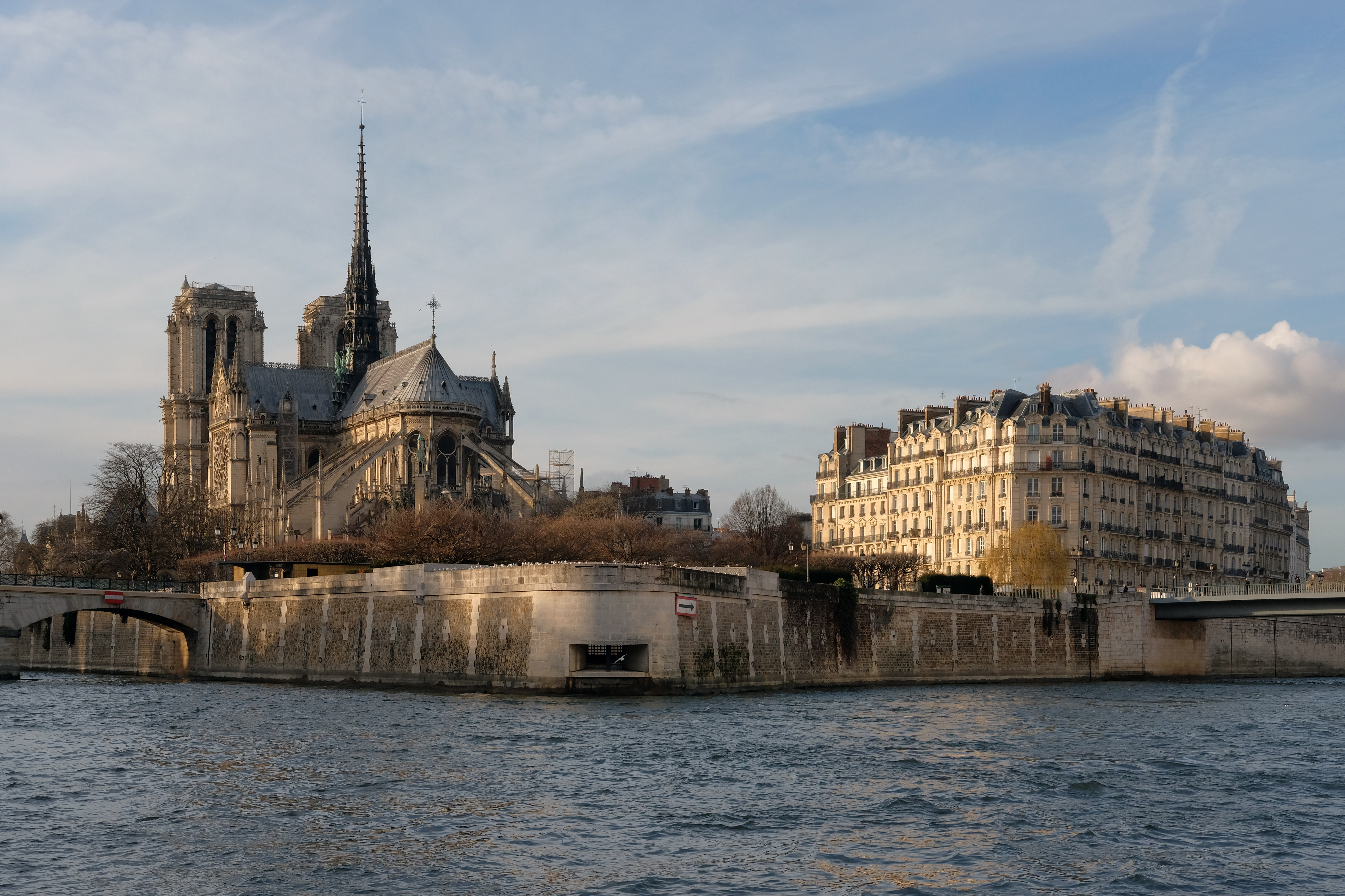 Île de la Cité avec la cathédrale Notre-Dame de Paris, vue du sud-est.